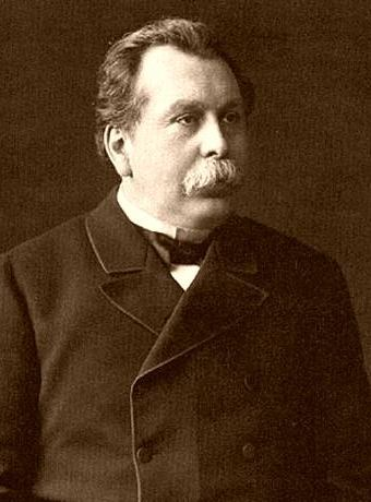 Русский государственный деятель, министр внутренних дел Вячеслав Константинович фон Плеве (1846-1904)